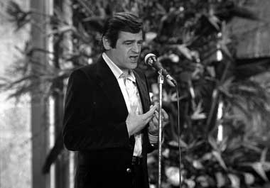 Sergio Endrigo al Festival di Sanremo 1970